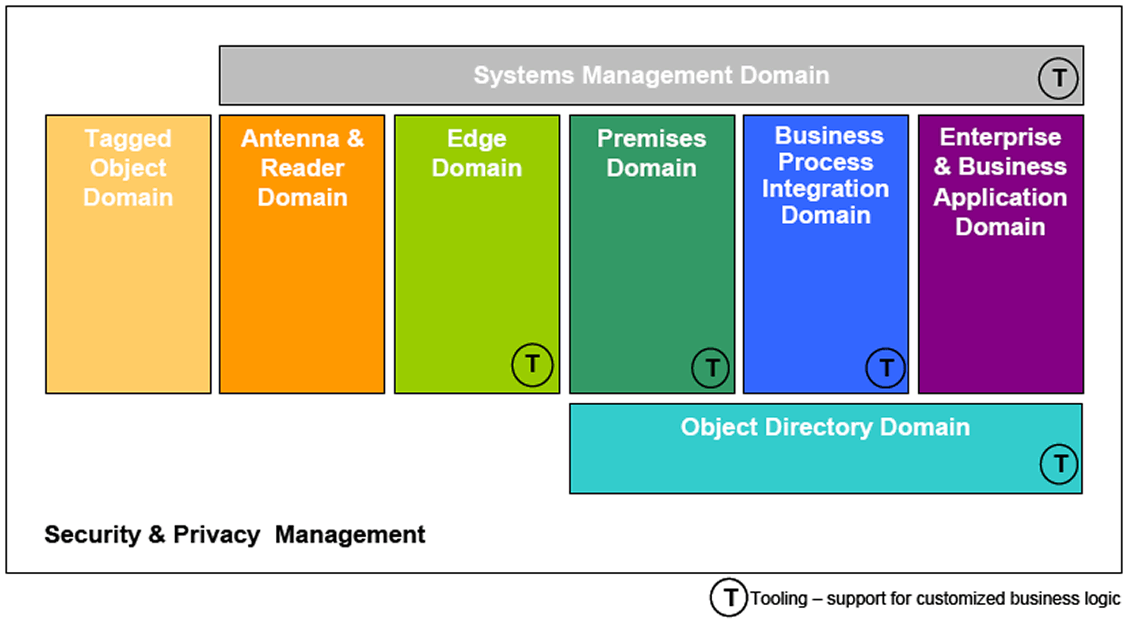 Porpuestra de estructura para un middleware RFID según EPC Global